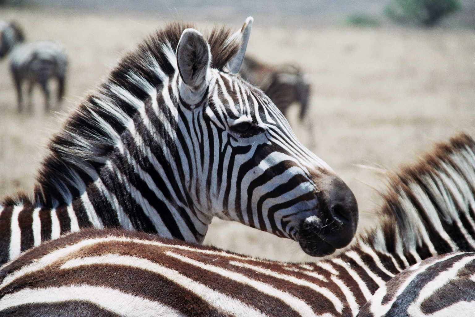 Zebra, Ngorongoro Crater